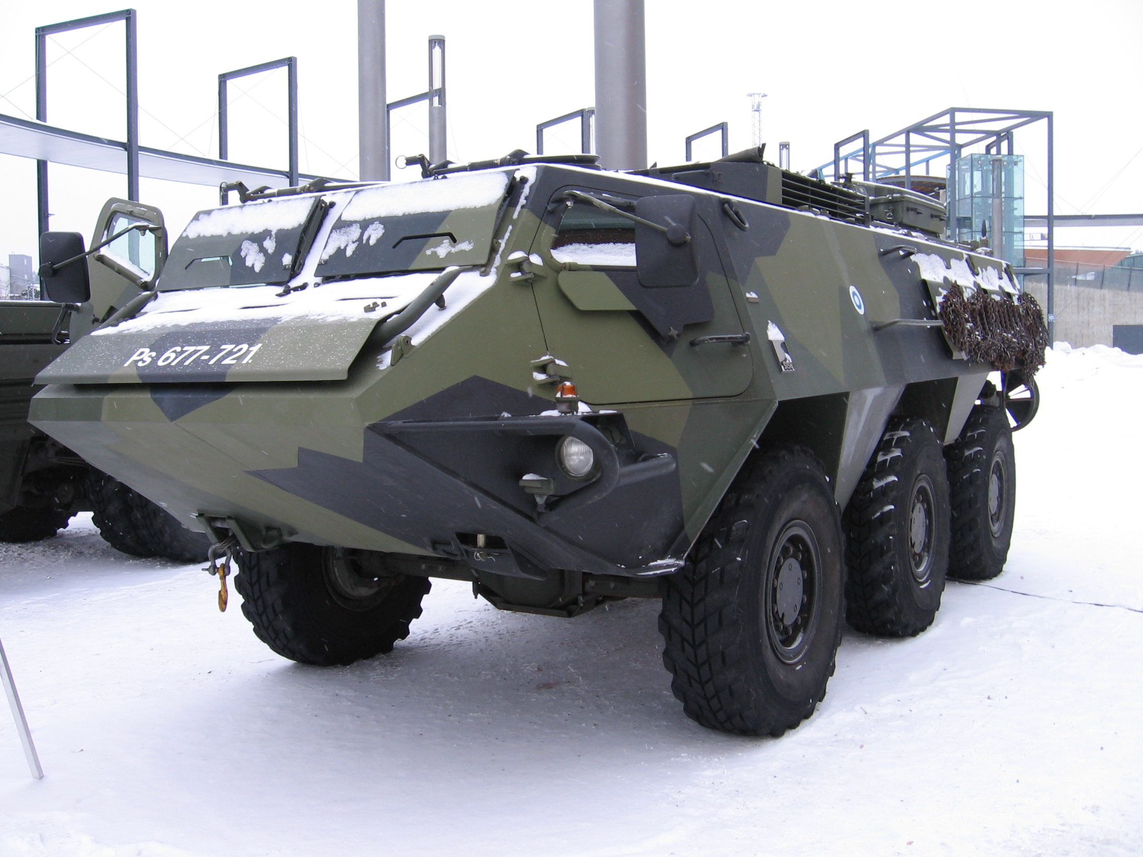 Zdjęcie zrobione w Jyväskylä w Finlandii podczas mini-pokazu fińskich sił zbrojnych.